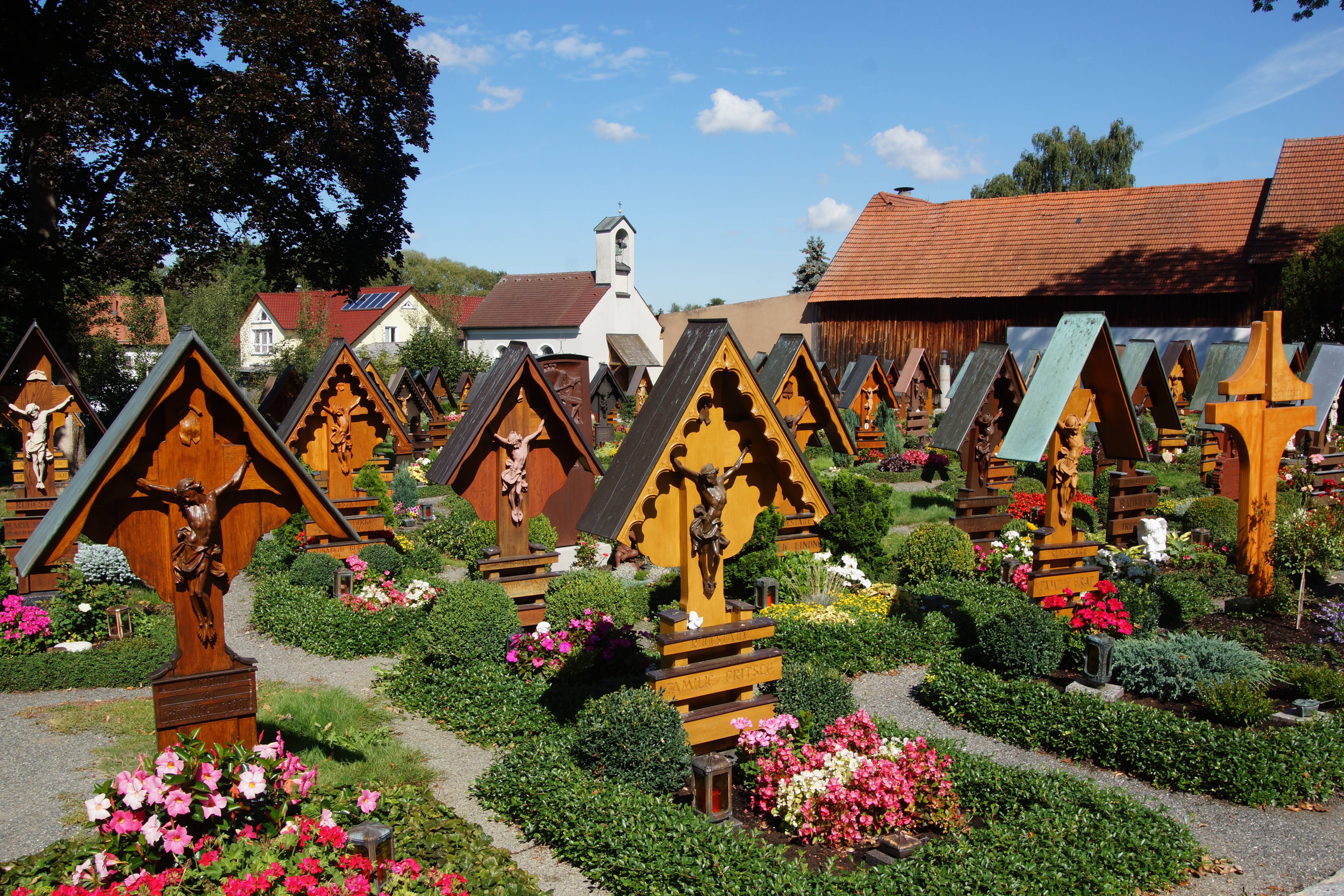 St. Jakob - Schirmitz